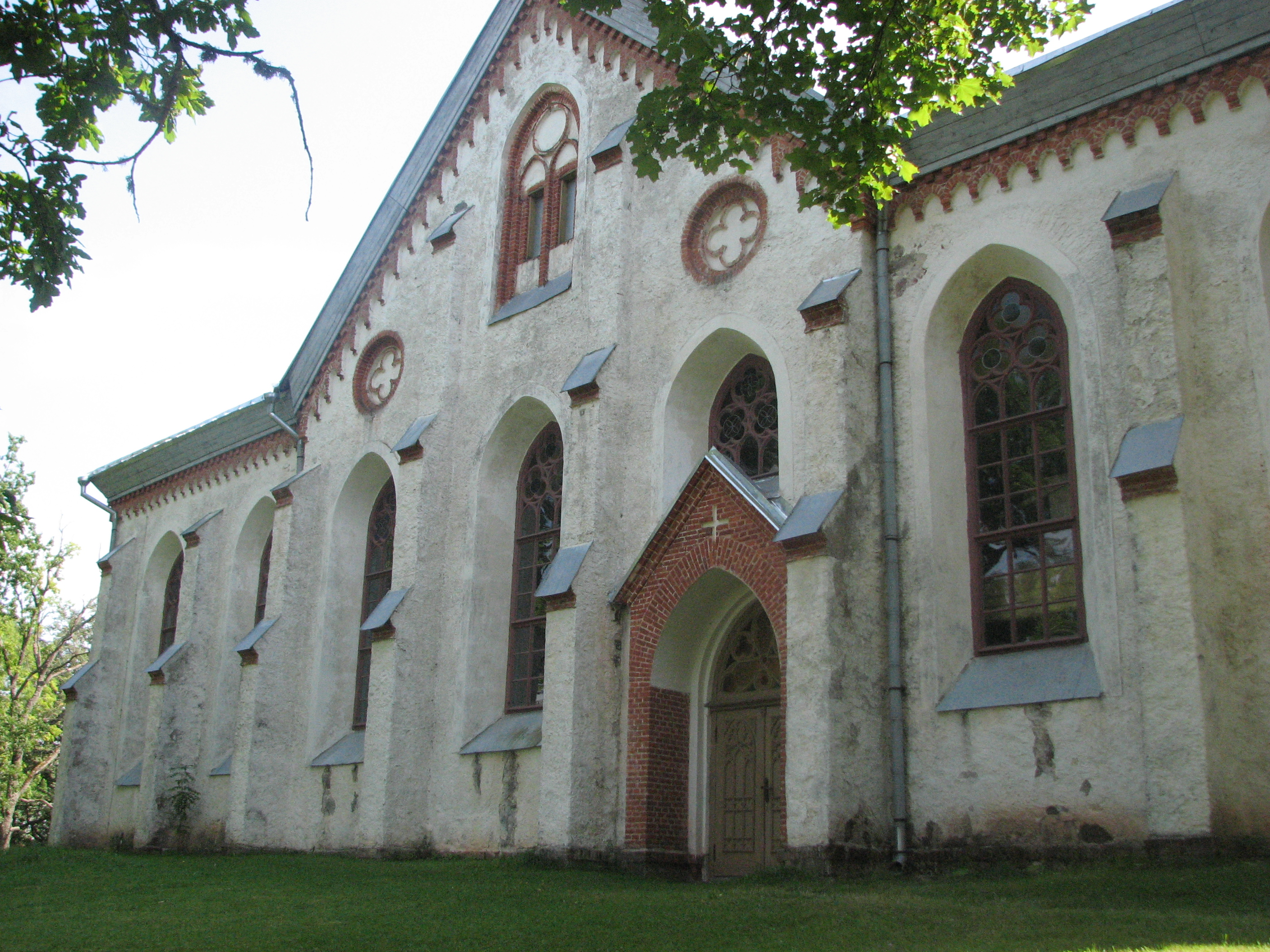 Otepää Church in Otepää, Estonia